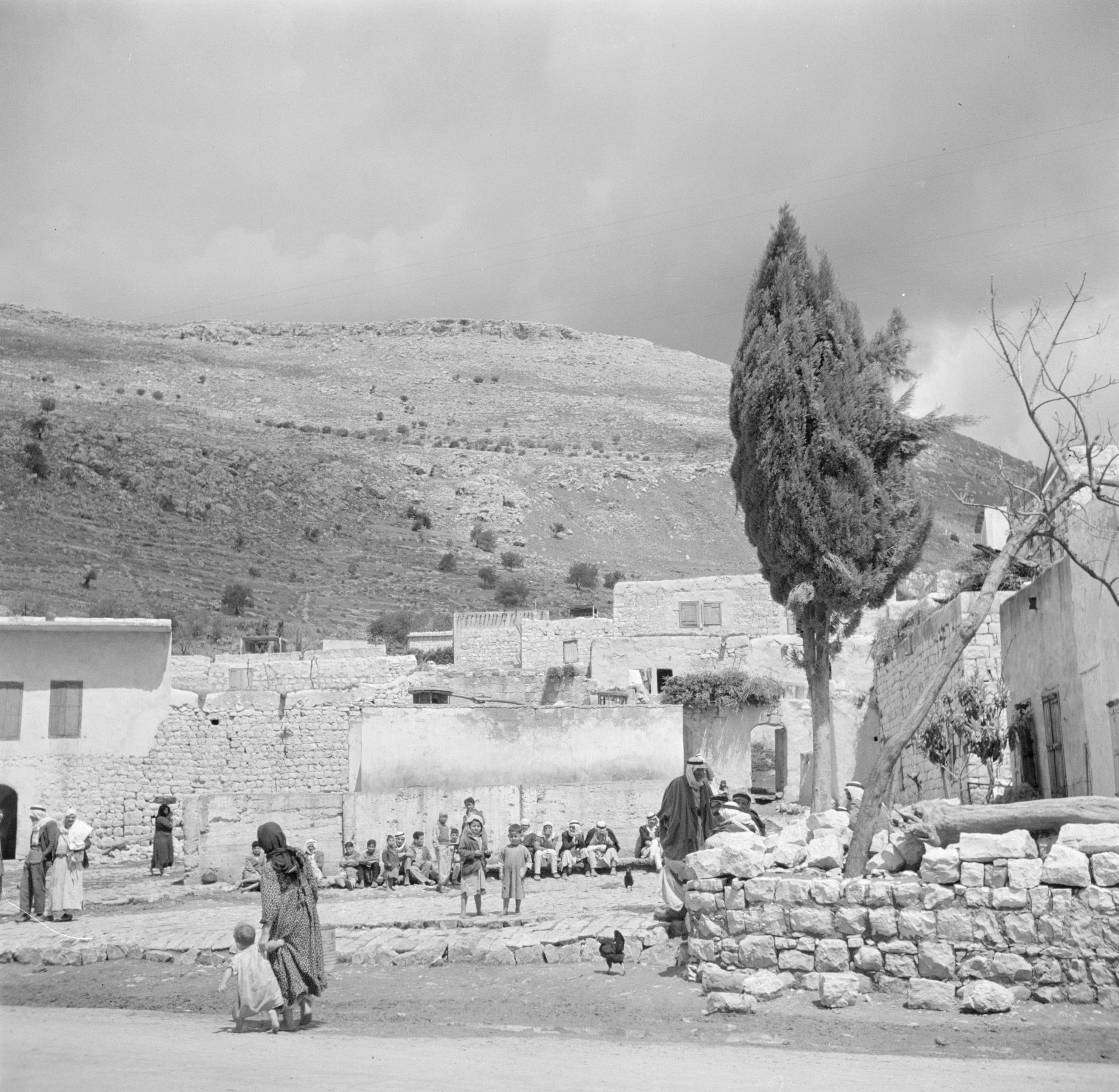 Collectie / Archief : Fotocollectie Van de Poll Reportage / Serie : Israël 1948-1949: Mag-del-Krum Beschrijving : Pleintje met kinderen en zittende mannen Annotatie : Het in Galilea gelegen dorp Mag-del-Krum, ook wel Majd al-Krum genoemd, is in 2003 opgegaan in de stad Shaghur (Shagor) Datum : 1948 Locatie : Galilea, Israël, Shagur Trefwoorden : heuvels, kinderen, mannen, pleinen, straatbeelden Fotograaf : Poll, Willem van de Auteursrechthebbende : Nationaal Archief Materiaalsoort : Negatief (zwart/wit) Nummer archiefinventaris : bekijk toegang 2.24.14.02 Bestanddeelnummer : 255-0113